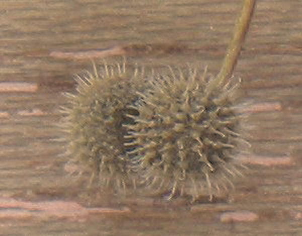 zelfgemaakte foto van doosvrucht van Kleefkruid Galium aparine; begin september